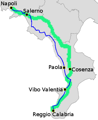 Paragone dei percorsi della Strada Statale 18 (in blu) e della Autostrada A3 (in verde), con indicate le principali città attraversate